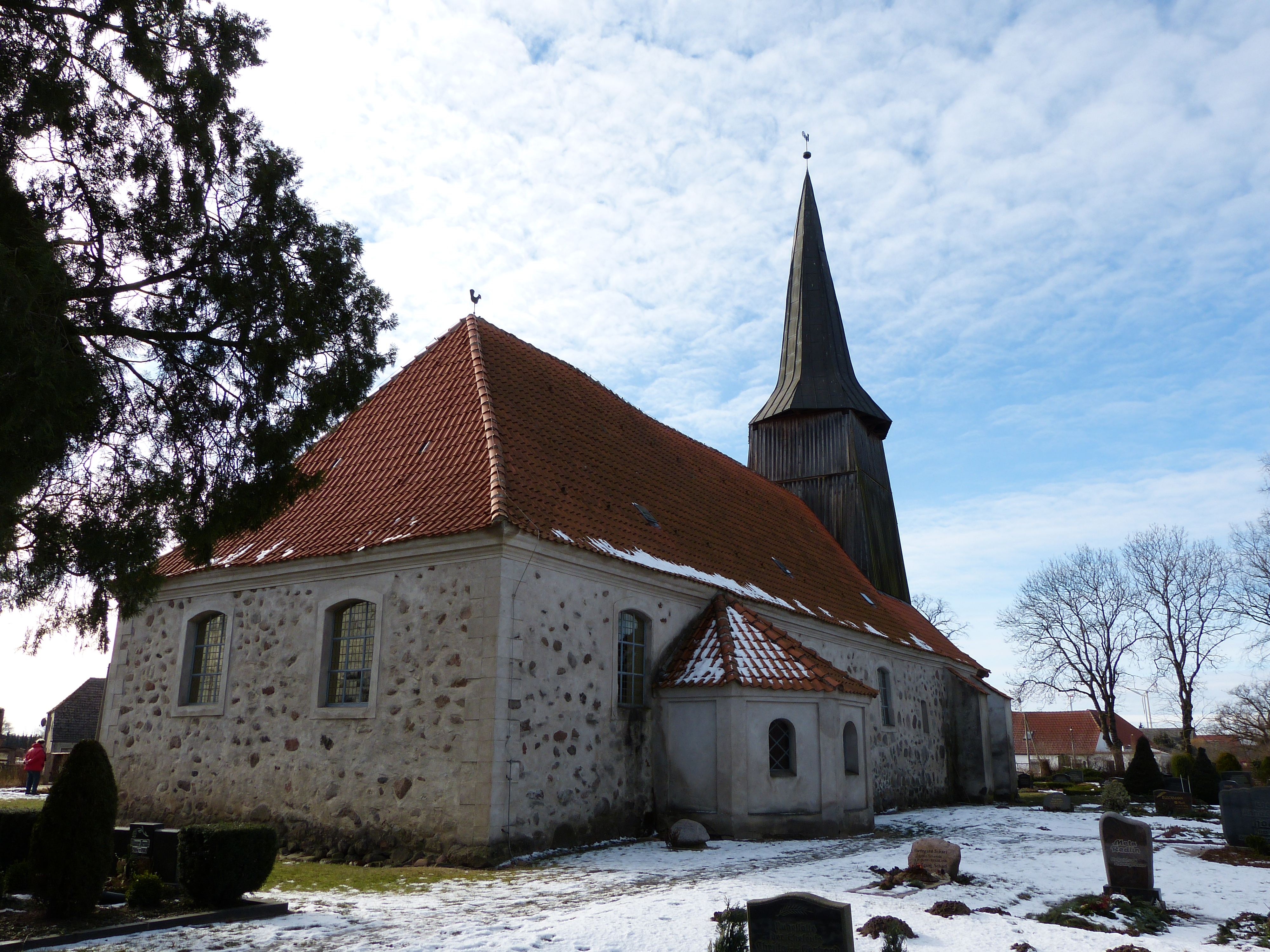 Kirche in Iven, Ostgiebel und Nordseite